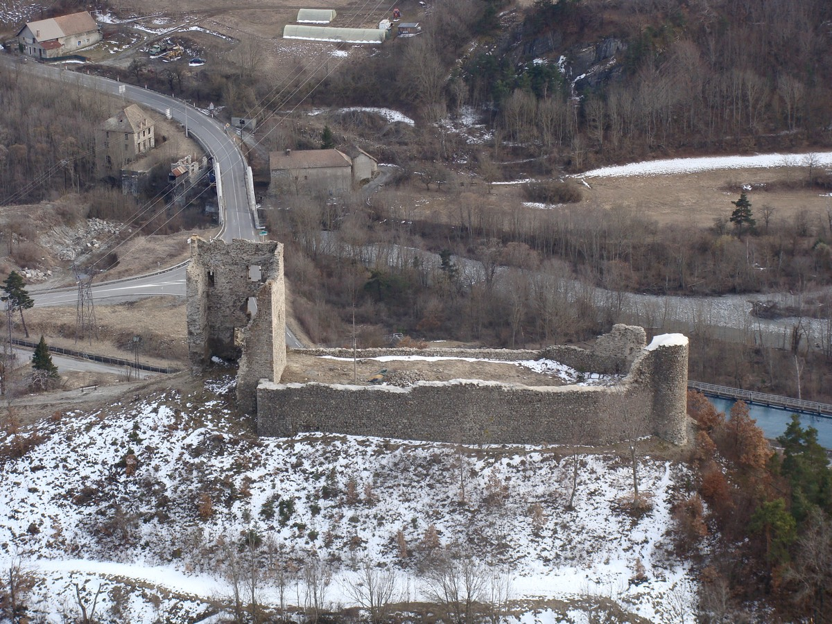 Les ruines du château-fort de Saint-Firmin, vues depuis la petite route d'Aspres (D 58) ; au second plan, la route de Gap (N 85) et le pont sur la Séveraisse.